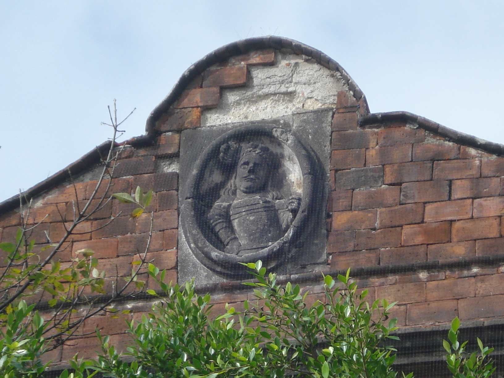 Detalle de la efigie de Don Juan Suárez de Peralta Casa de la Bola. Tacubaya, México, D. F